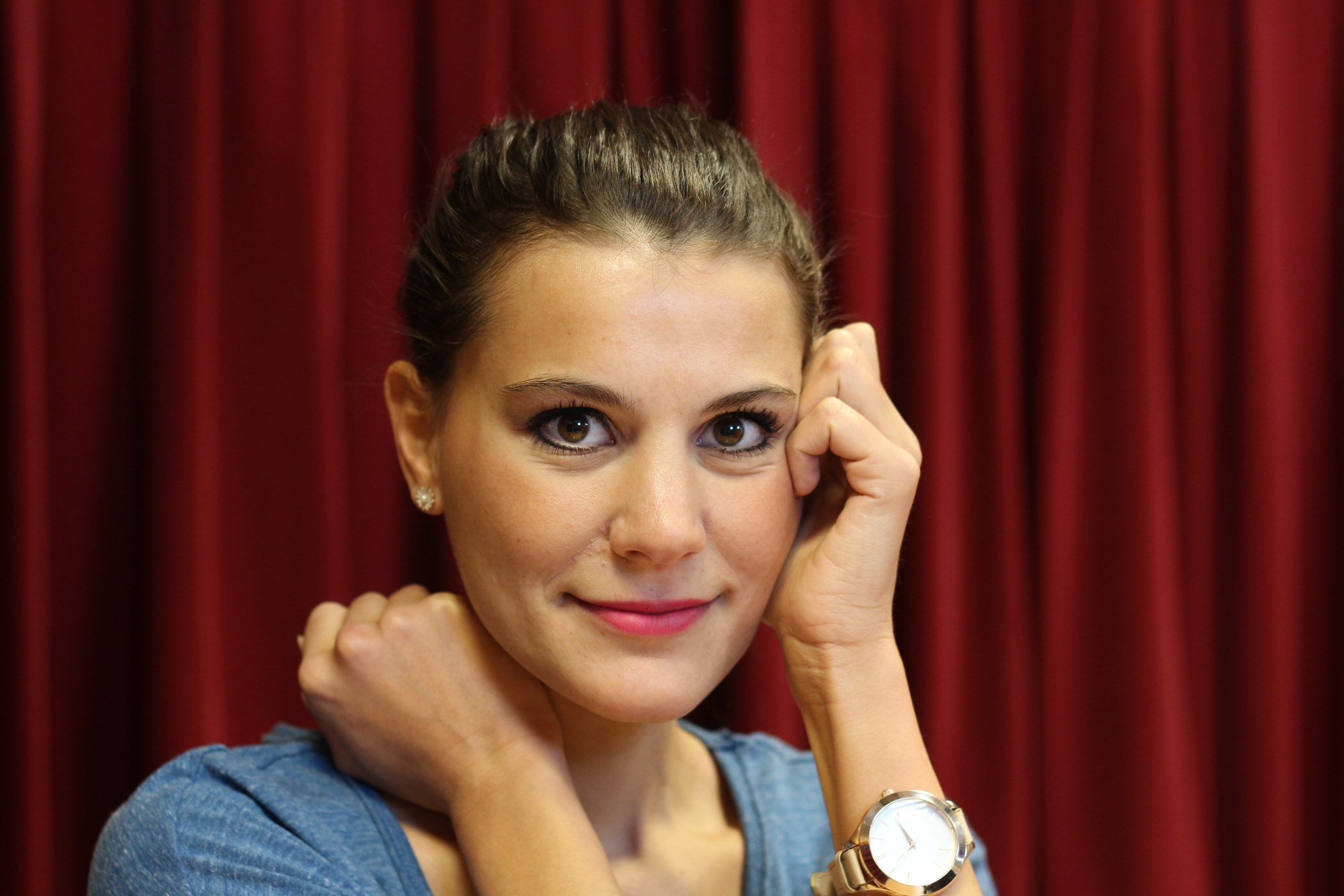 herečka Monika Timková, t.č. ve studiu ČRo Region Jihlava